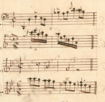 Table du volume XV des manuscrits de Parme (incipit des sonates 39 à 42, K. 552 à 555).